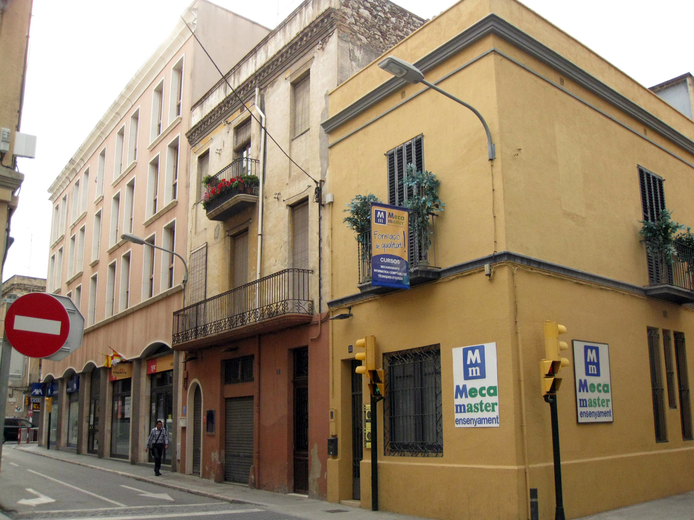 Conjunt carrer Sant Llàtzer (Figueres)